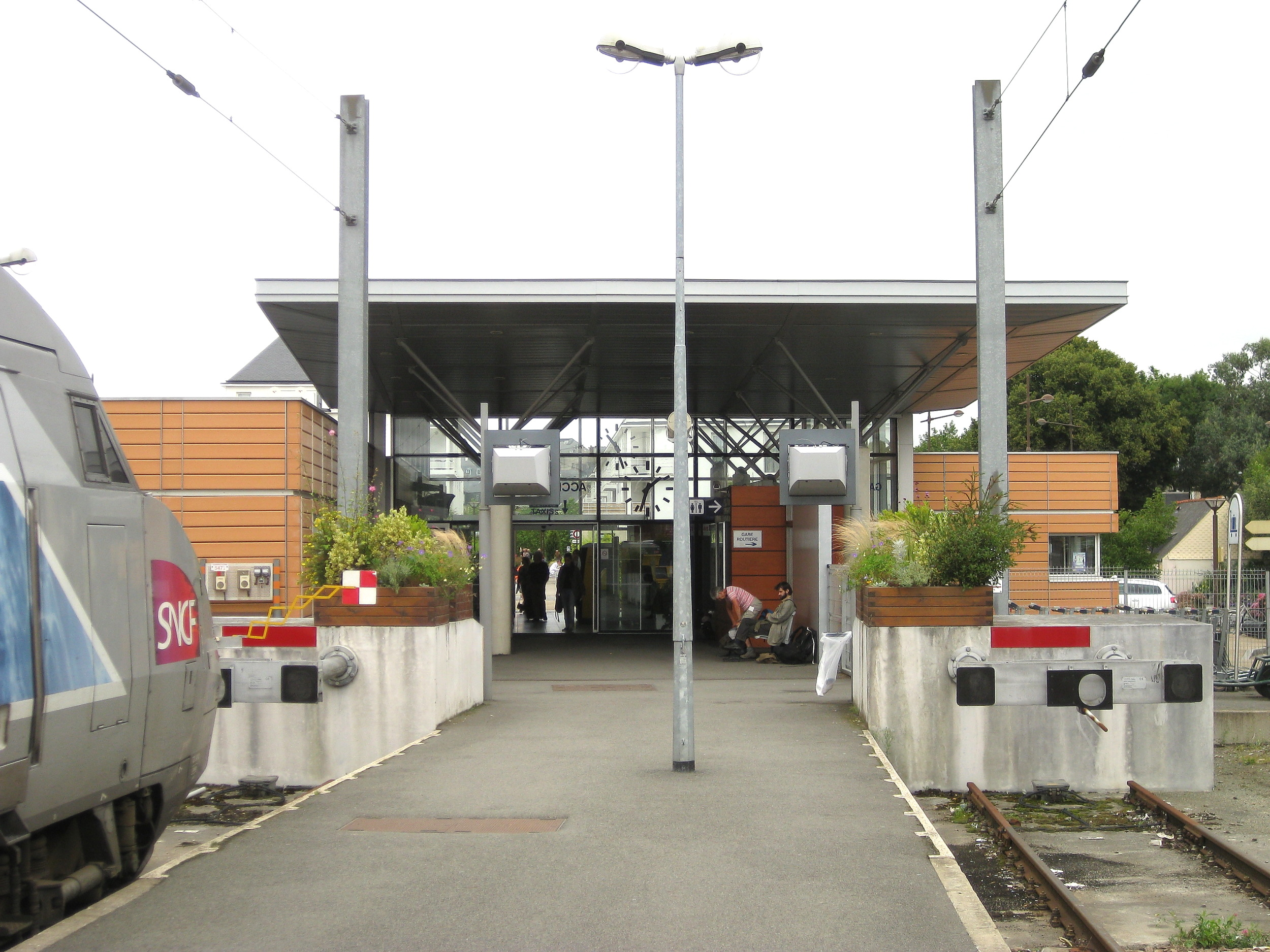 Le bâtiment voyageurs vu depuis les quais.